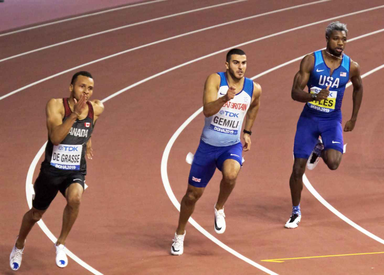 DOH50265 200m men final